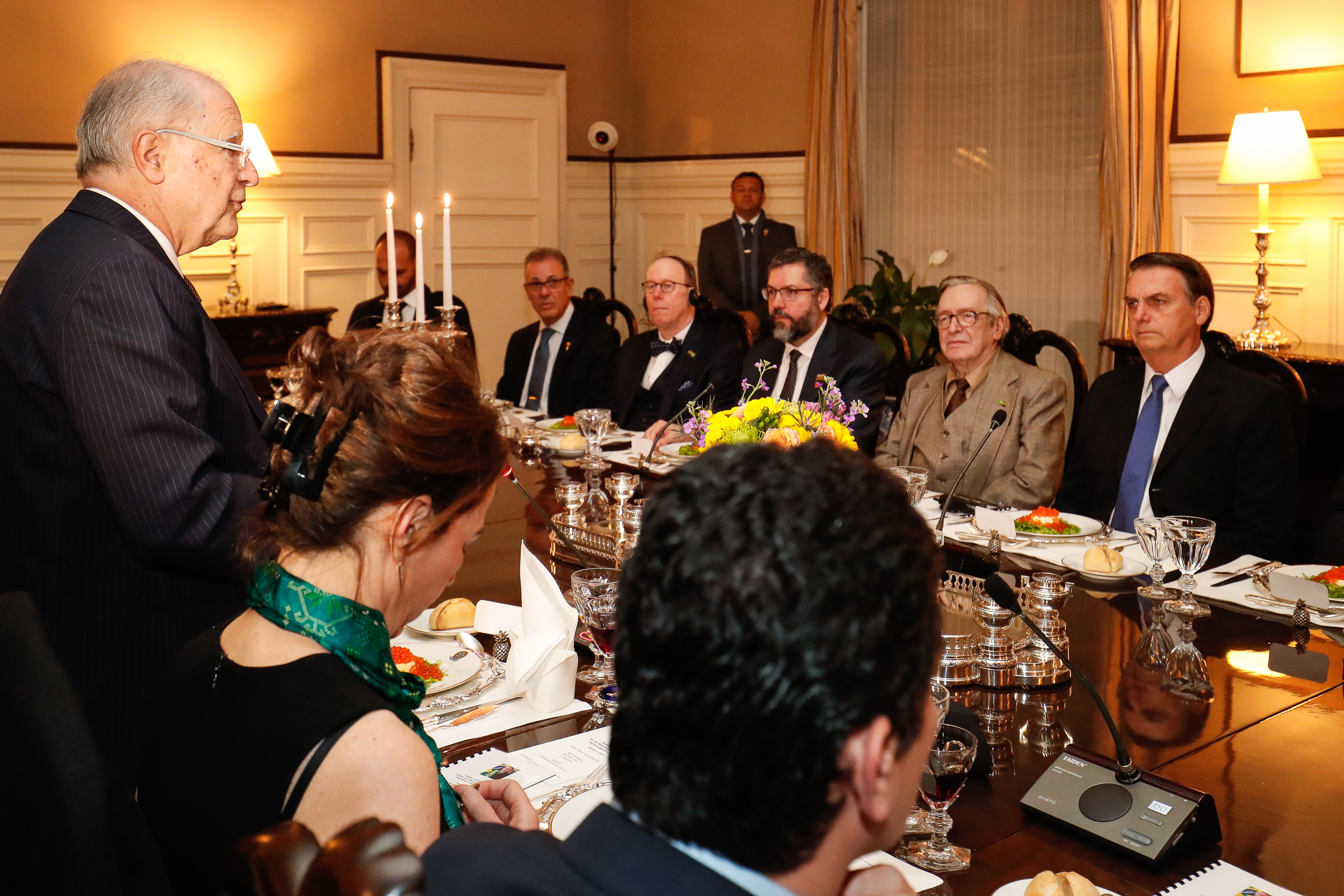 Sérgio Amaral falando em jantar com Jair Bolsonaro e outras autoridades em Washington, D.C. em 2019.